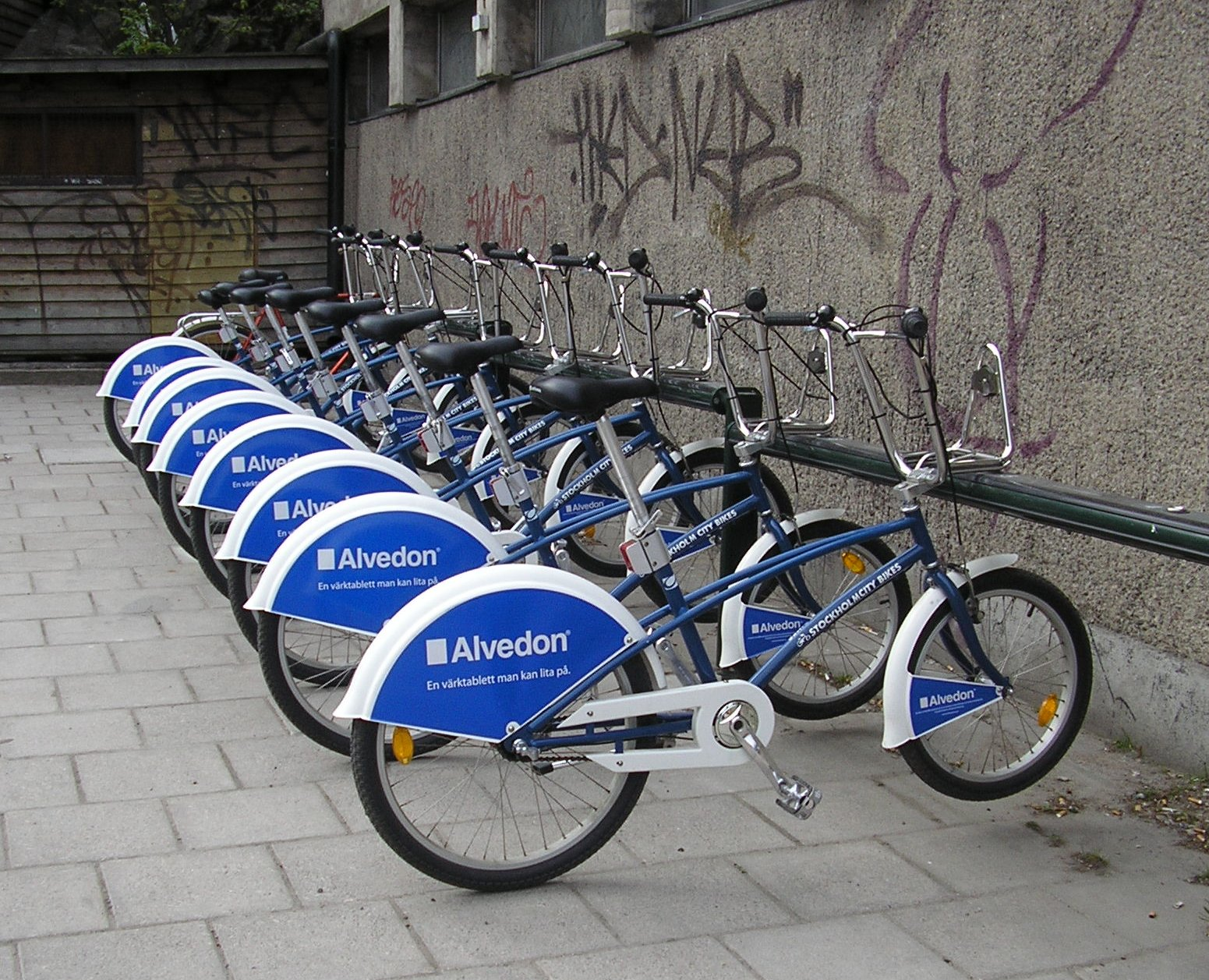 Lender bikes in Stockholm